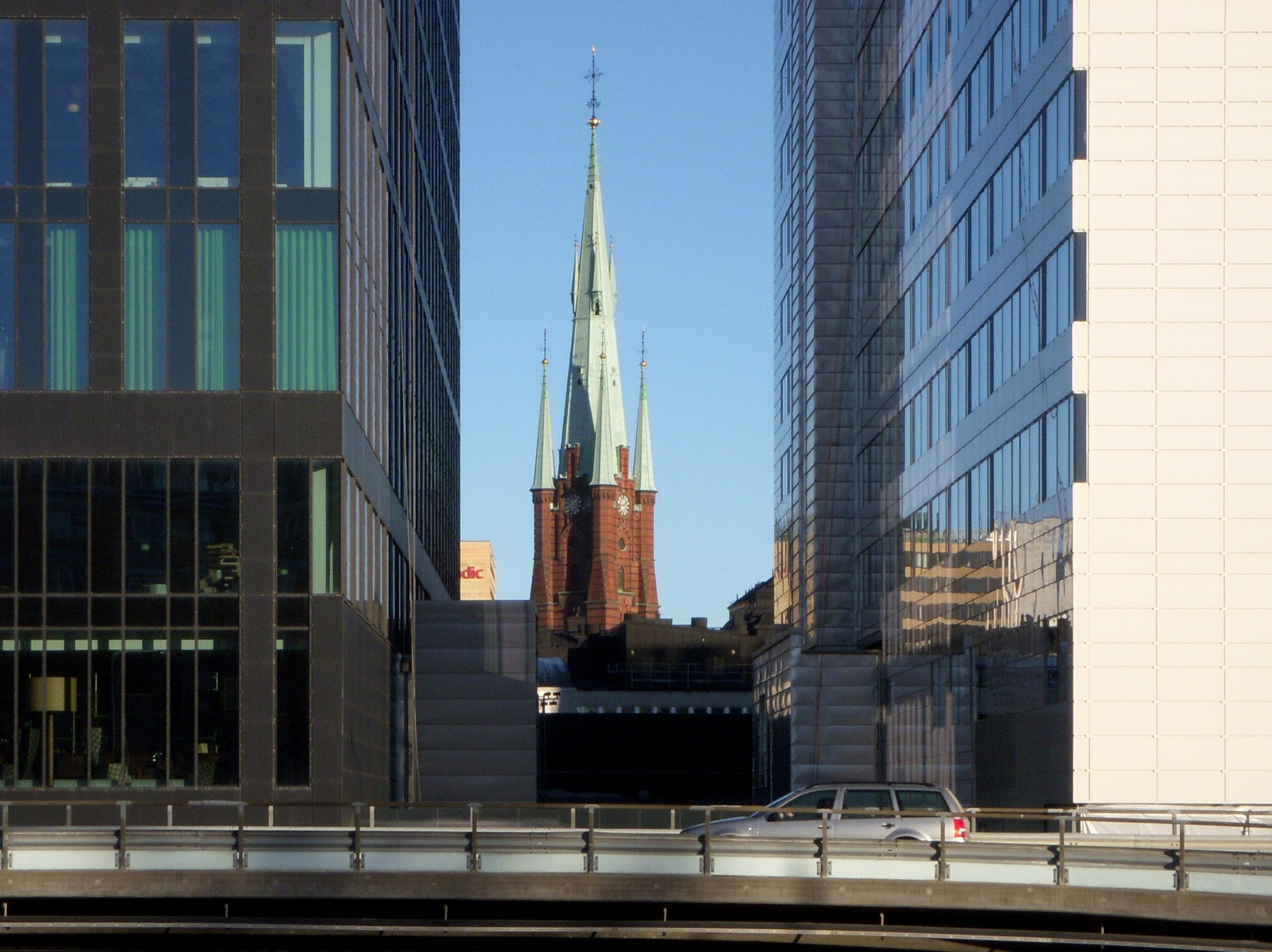 Waterfront Building, Stockholm. Gammalt möter nytt, Klara kyrka i bakgrunden.